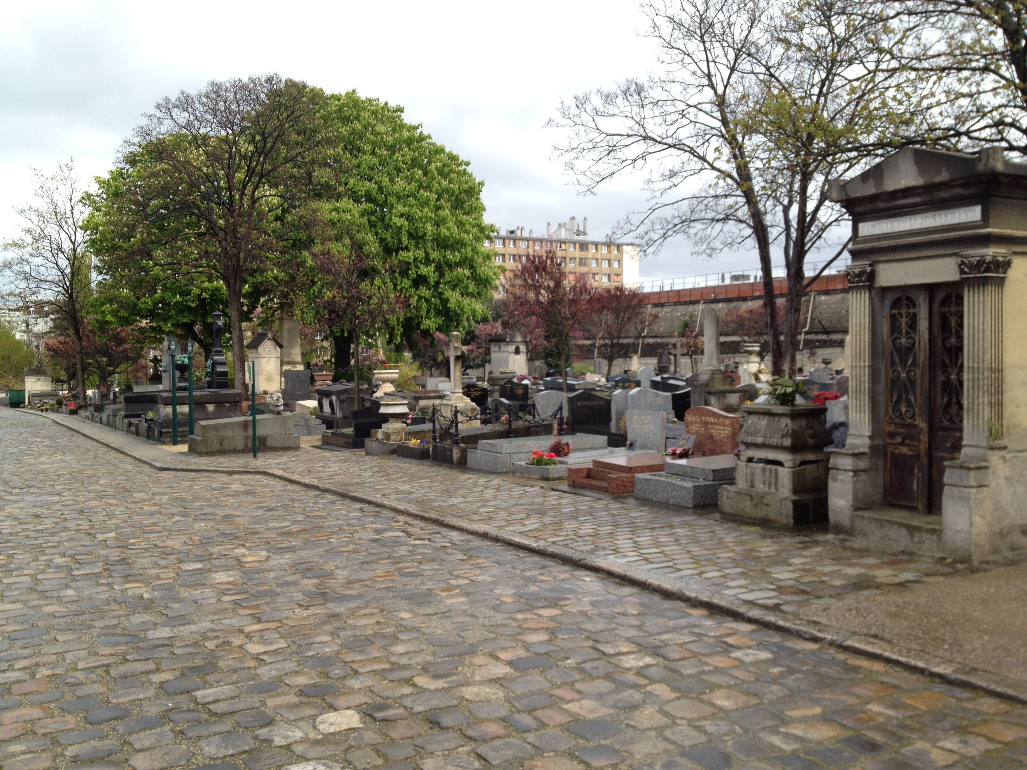 Cimetière de Belleville, rue du Télégraphe à Paris (France).